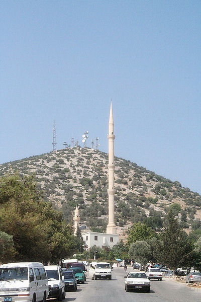 Eshab-ı Keyf (Yedi Uyurlar) Mağarası, Tarsus, Mersin